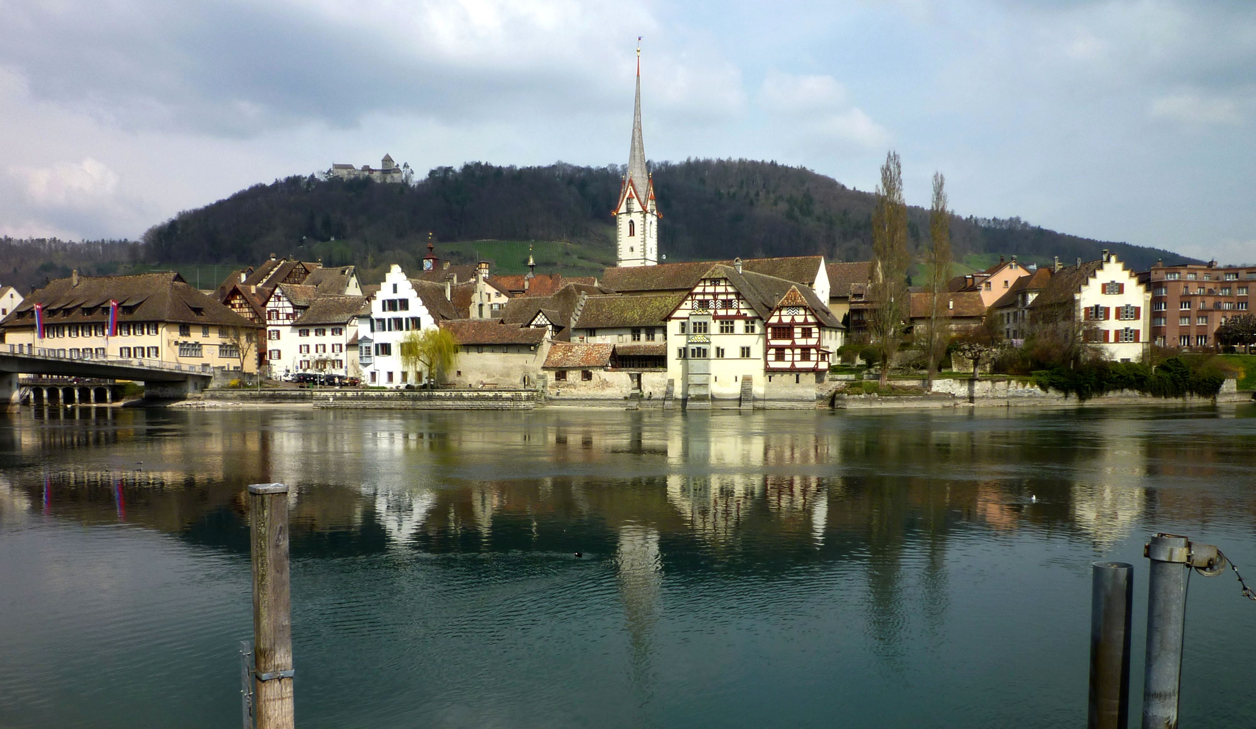 Stein am Rhein-Stadtkirche und Kloster St.Georgen.jpg